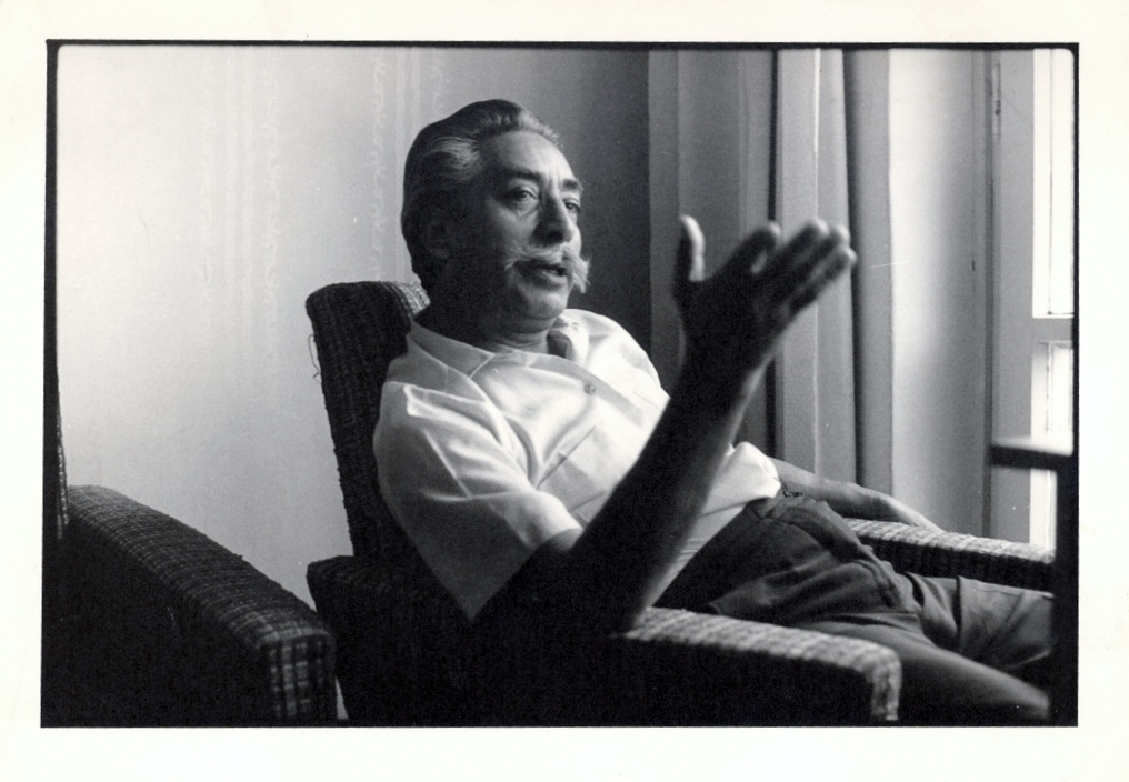 El político comunista chileno Ernesto Araneda